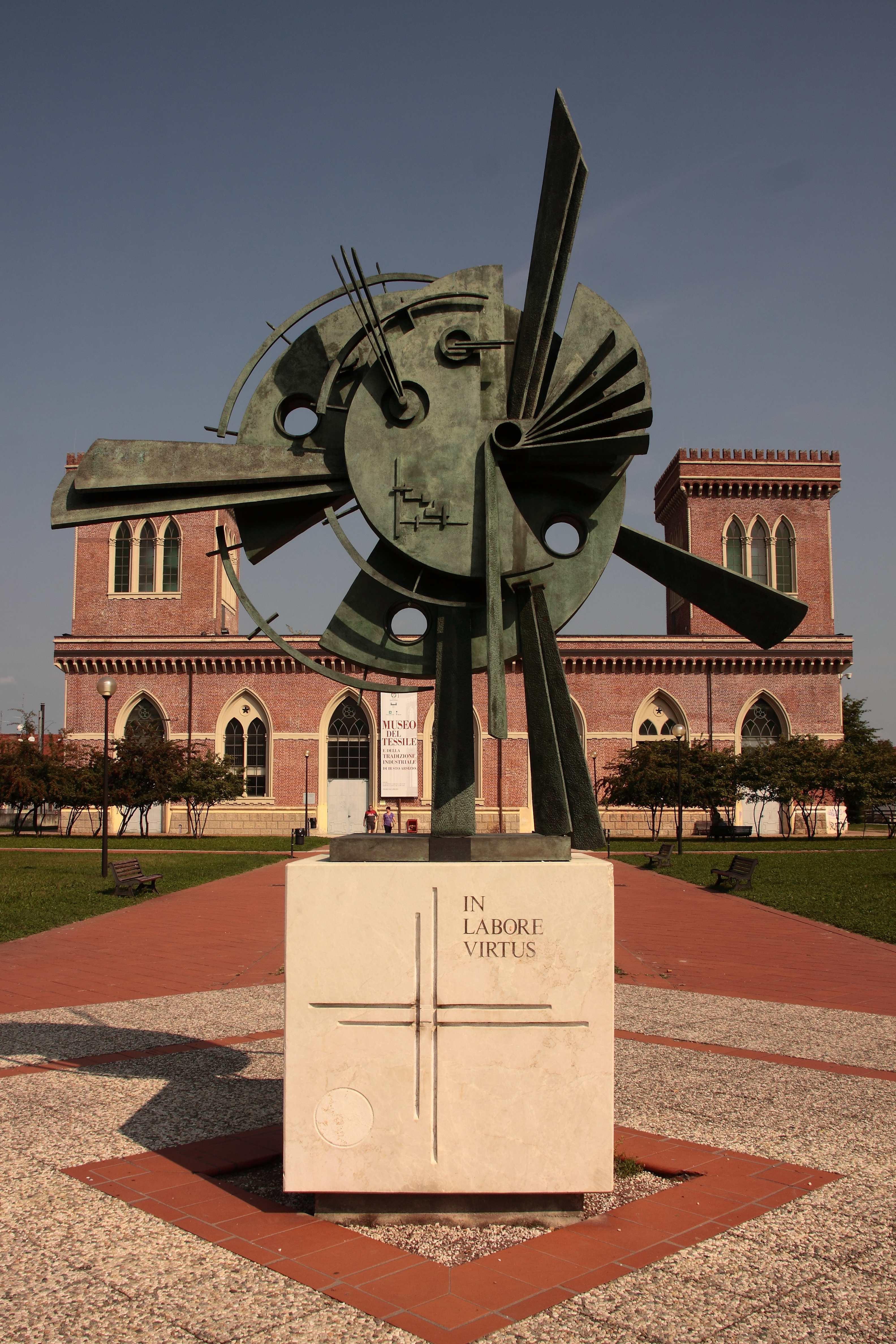 Museo del tessile e della tradizione industriale This is a photo of a monument which is part of cultural heritage of Italy.